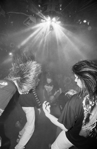 Heavy Metaller in der Disco Fantasy (1981-2001) in München-Neuaubing